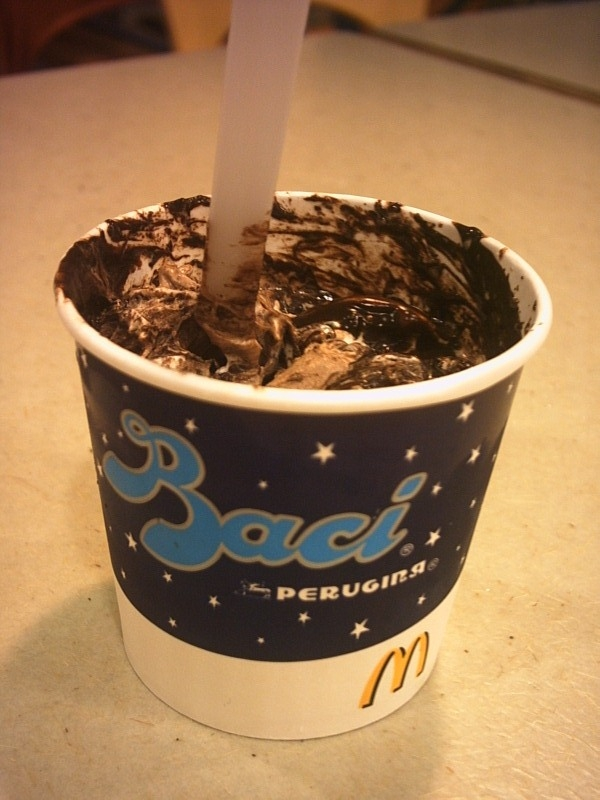 O chocolate italiano que custa os olhos da cara na tem uma versao sorvete no McDonald's italiano. (2006)